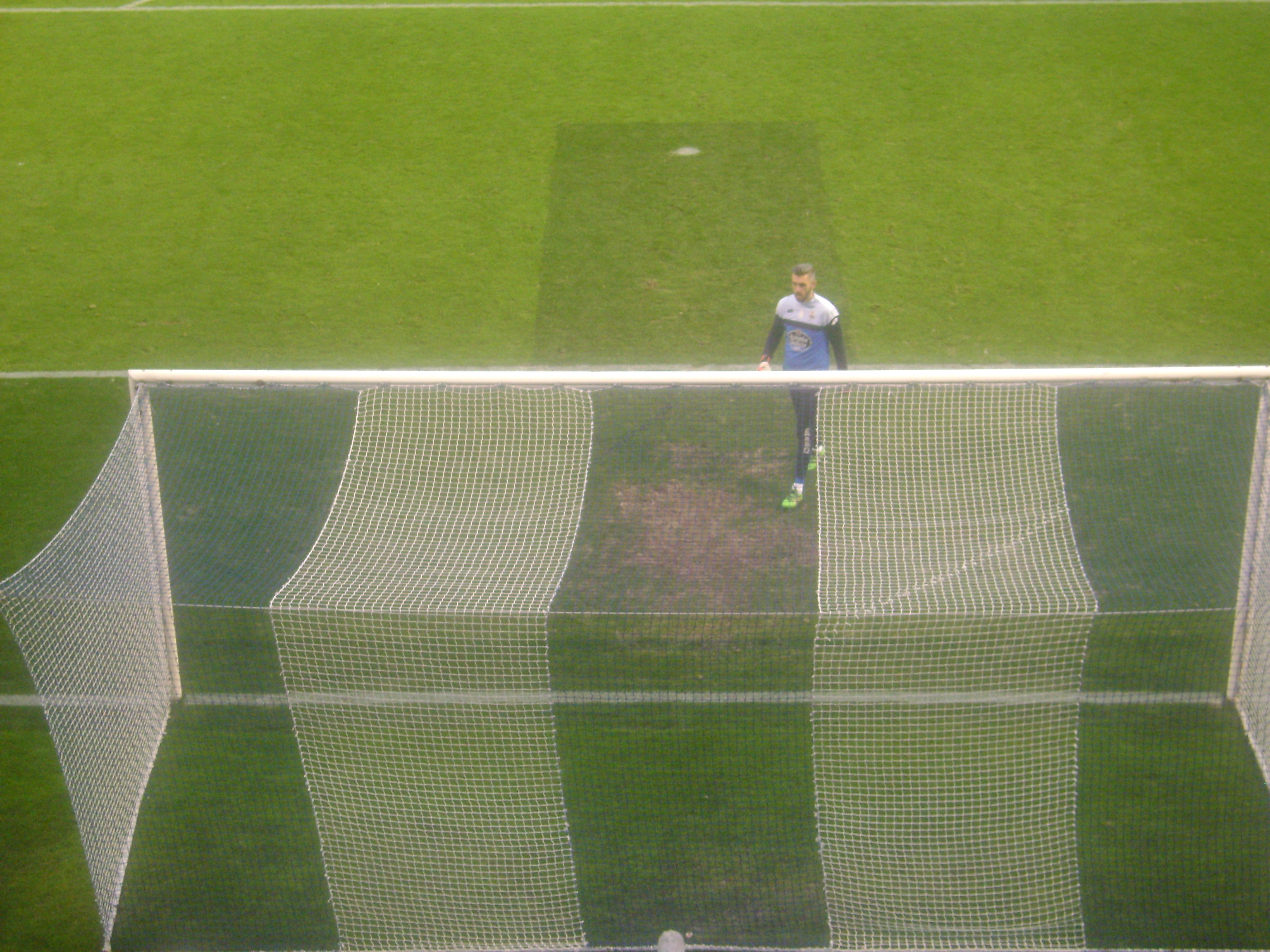 Pletikosa.